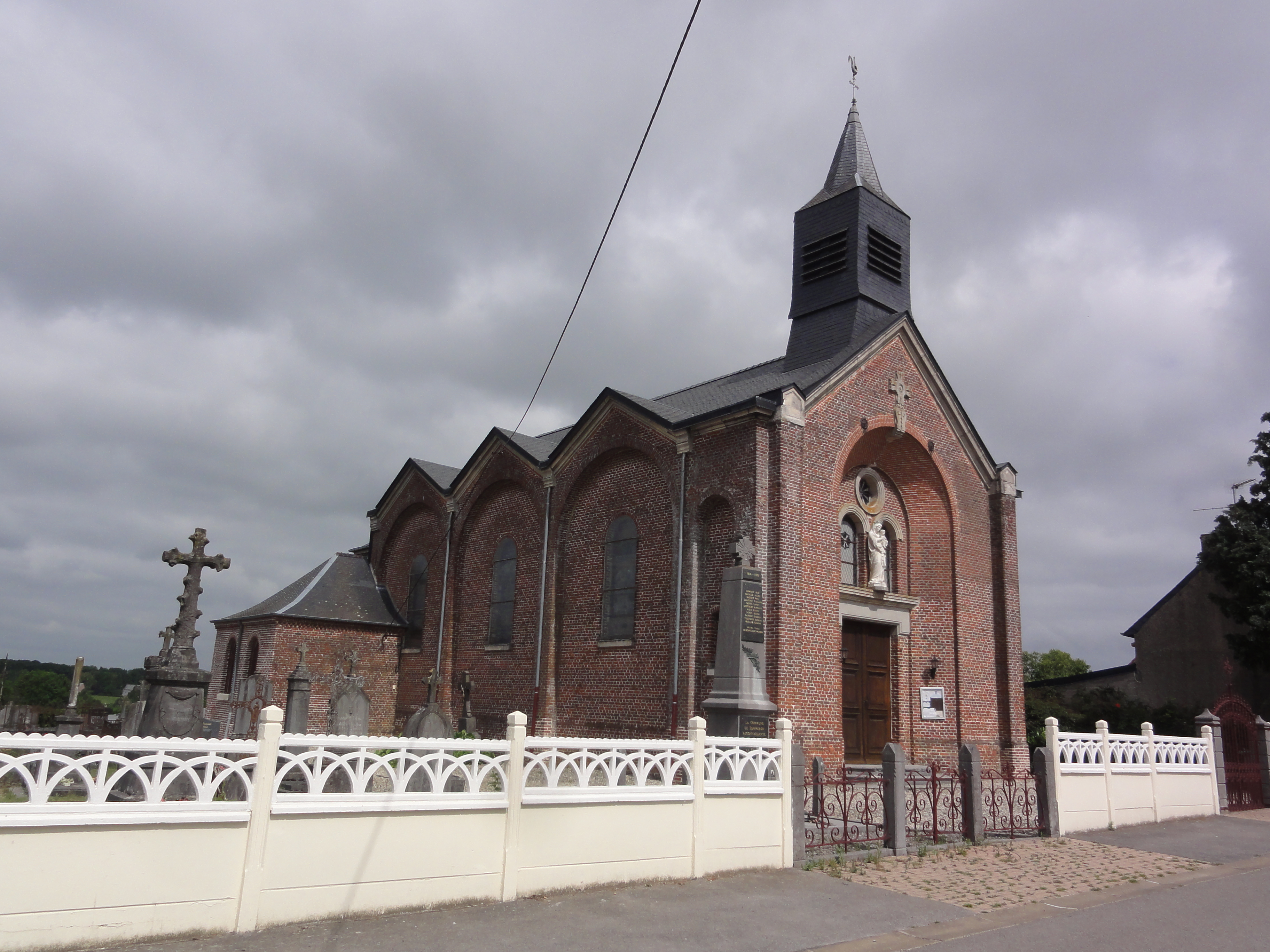 Sommeron (Aisne) église, latéral